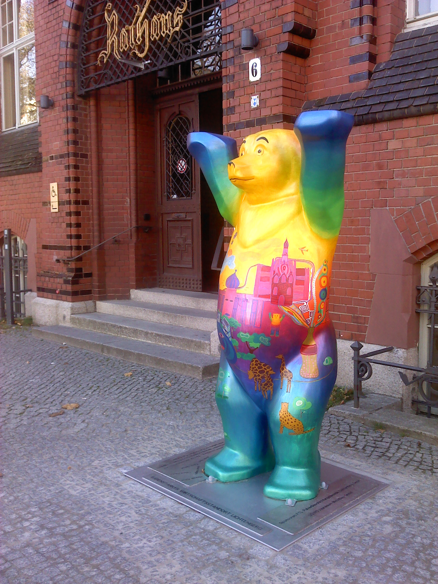 Buddy Bear vor dem Lichtenberger Rathaus